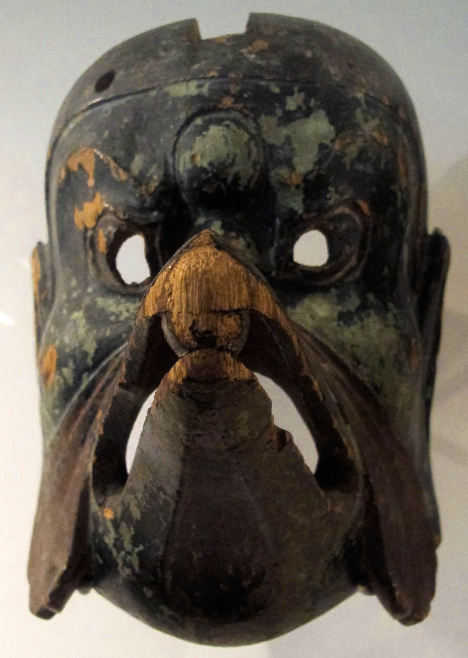 Epoca nara, maschere per gigaku, karura, VIII sec